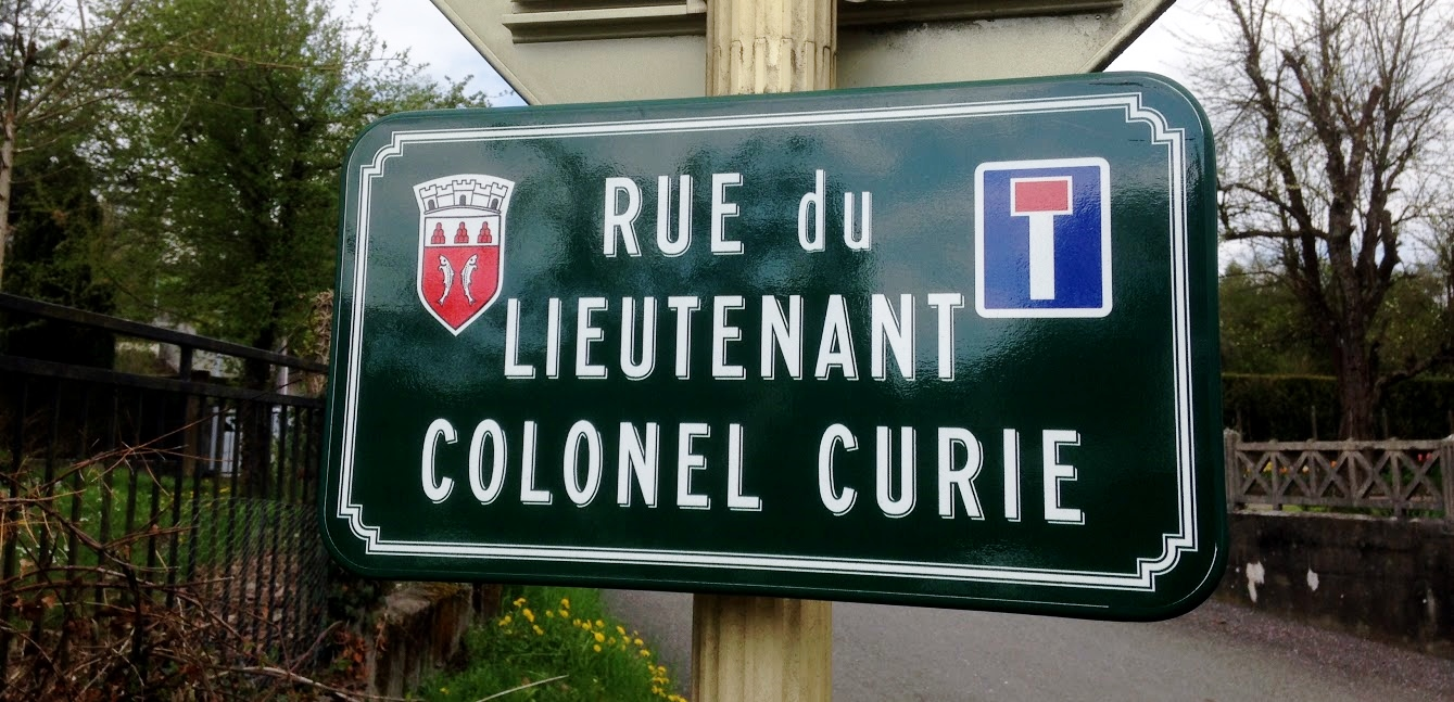 Cette rue est une perpendiculaire à la route de Dampierre-les-Bois.